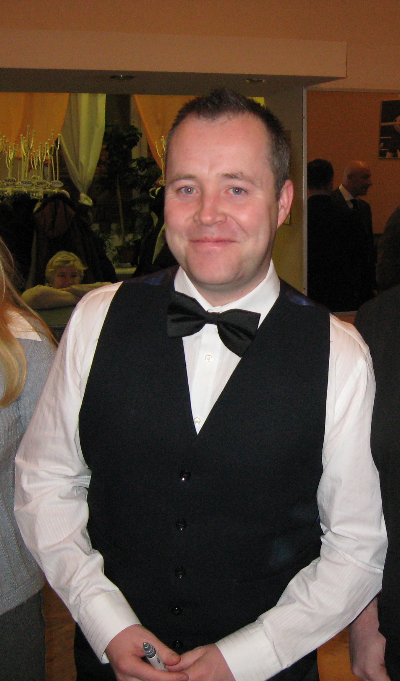 Туринир World Series of Snooker в Москве